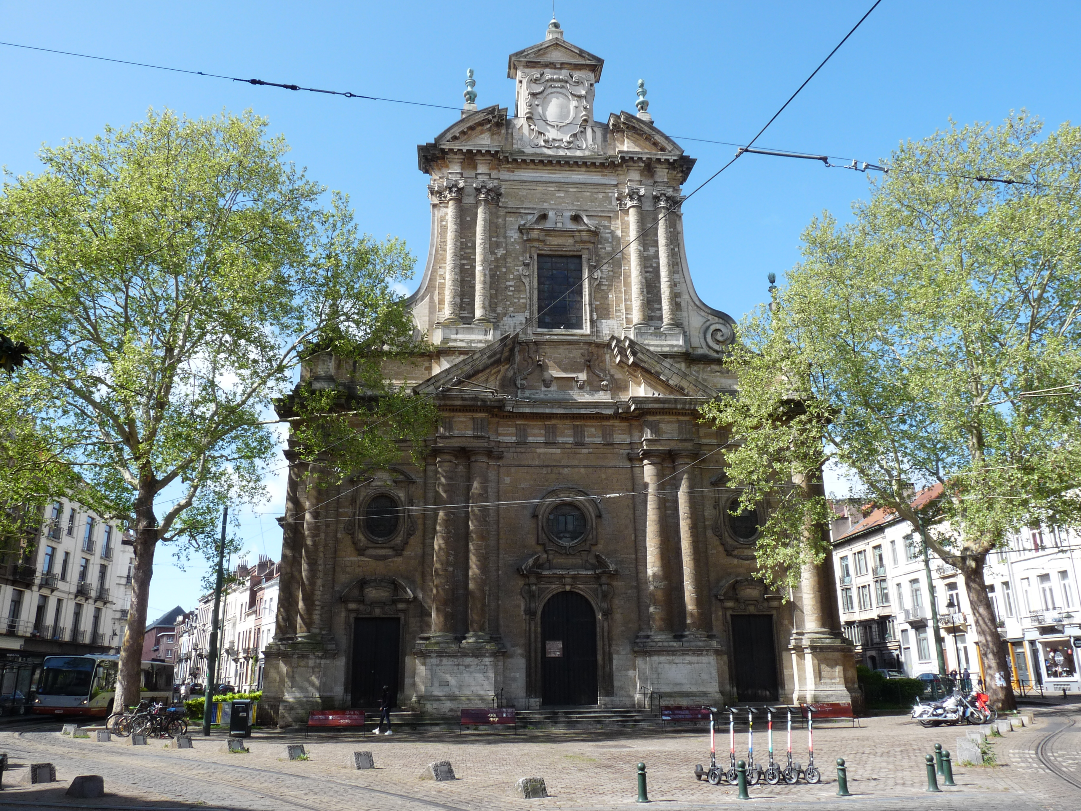 De kerk van de Heilige Drievuldigheid